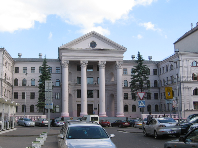 Белорусская государственная академия музыки (Косерватория), Минск